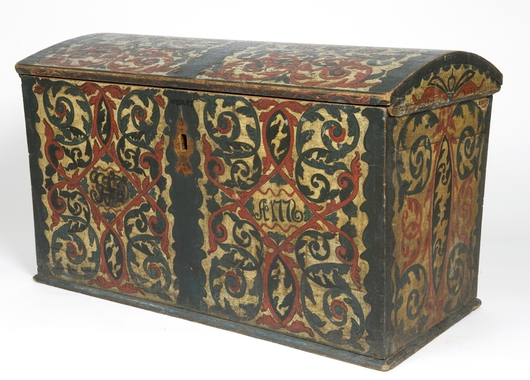 Kiste fra Telemark med initialer DTD og datering 1776. Kista er malt av Talleiv Målar og skal ha tilhørt Eidsvoldsmannen Tallef Huvestav. Lende 102 cm. Foto Anne-Lise Reinsfelt, Norsk Folkemuseum, NF.1897-0830.